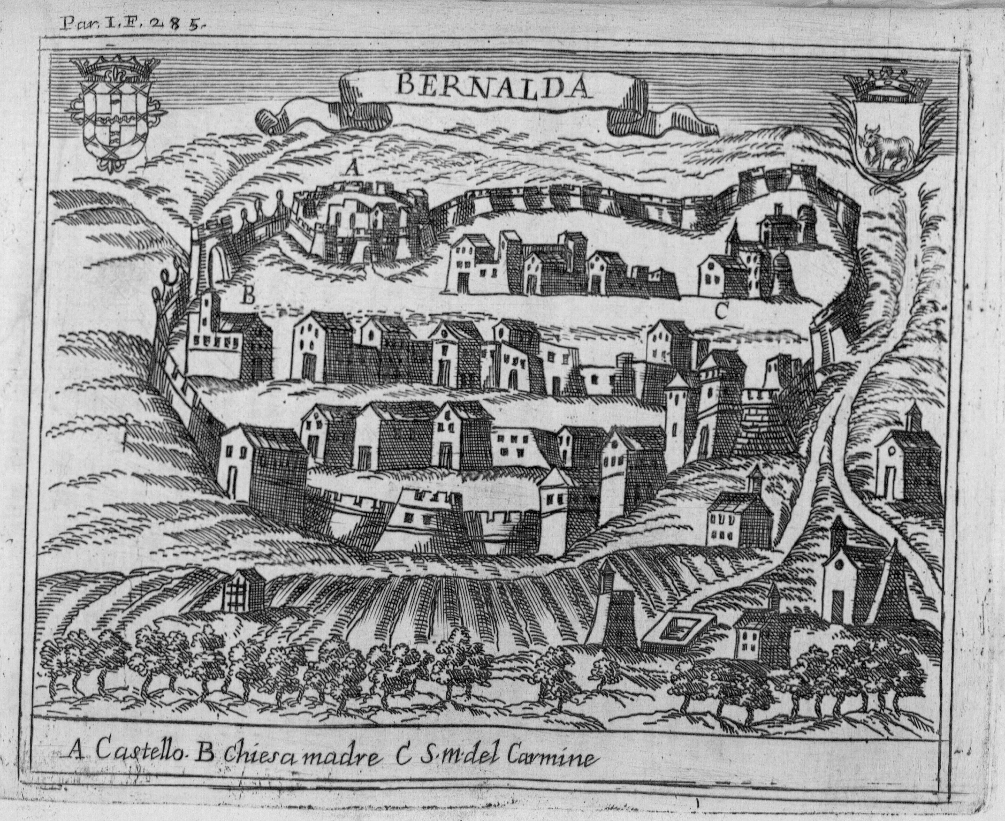 Autor: Pacichelli, Giovanni Battista, 1641-1702 Descripción bibliográfica: Il regno di Napoli in prospettiva : diviso in dodeci provincie, in cui si descrivono la sua Metropoli Fidelissima città di Napoli ... Opera postuma divisa in tre parti / dell'abatte Gio. Battista Pacichelli ; Parte prima [-terza] ... Del regno di Napoli in prospettiva / dell'abate Pacichelli. Parte prima. - In Napoli : nella Stamperia di Michele Luigi Mutio, 1703. - v. : principalmente il.; 4º . - Inic. adorn. y frisos dec. - Grab. calc. y h. pleg. grab. calc. de mapas de Cassianus de Silva. Ilustrador: Cassiano De Silva, Francesco, il. Impresor: Muzio, Michele Luigi, imp. Lugar de impresión: Italia. Nápoles Localización: Vea la ilustración en su contexto